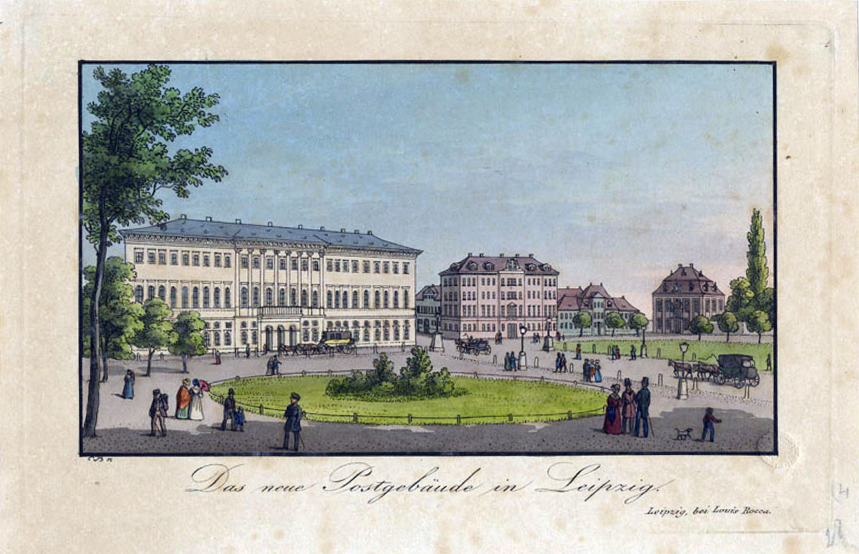 Das Neue Postgebäude in Leipzig, kolorierter Kupferstich